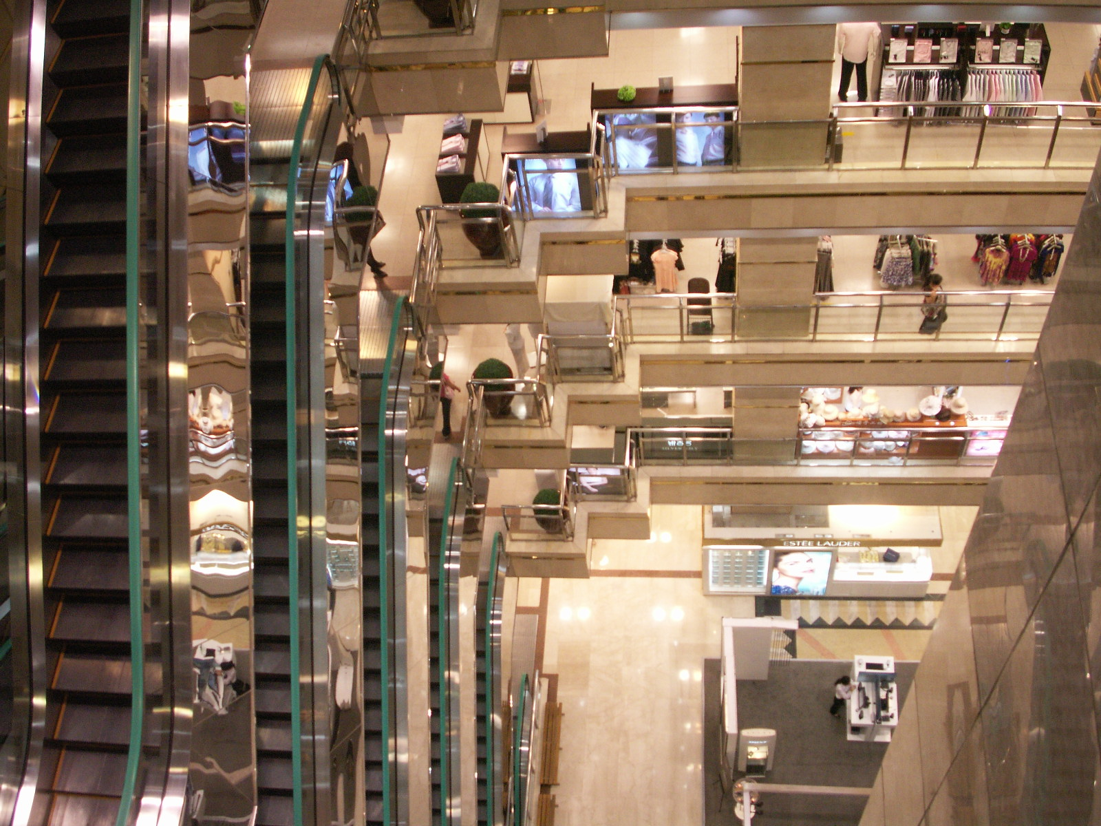 平和堂の中